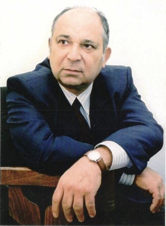 Коипозитор Акшин Ализаде